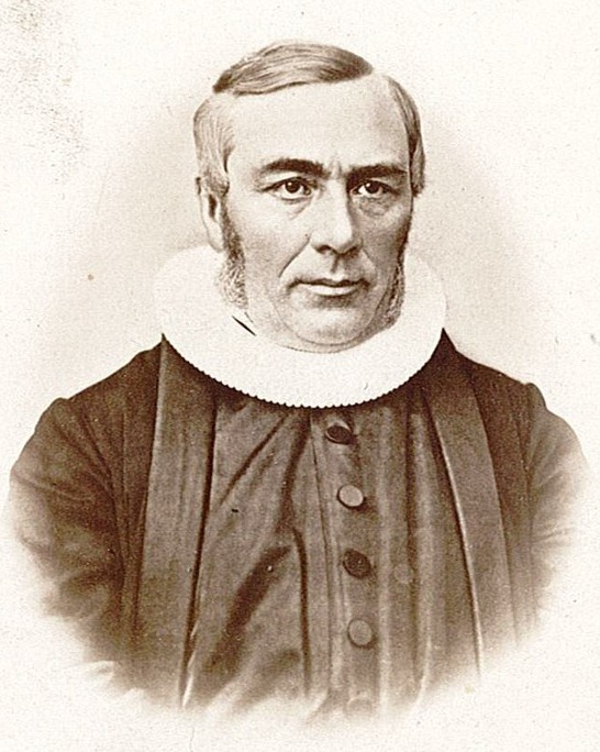 portrett, mann, prest, prestekjole, vignettert brystbilde.